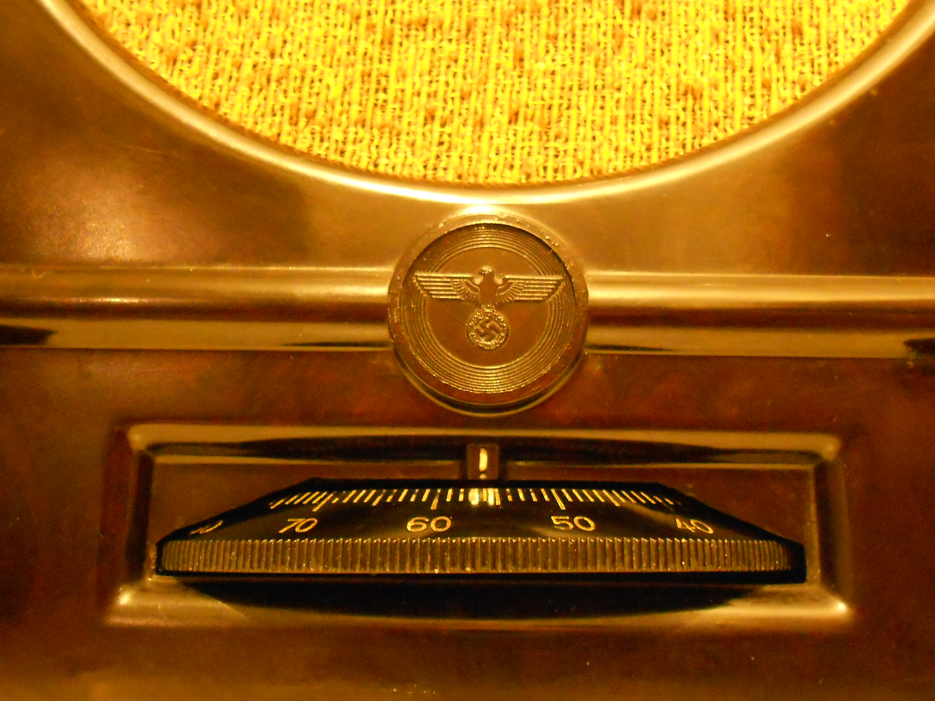 Fregio stampato sull'involucro in bachelite del Volksempfänger DKE 38